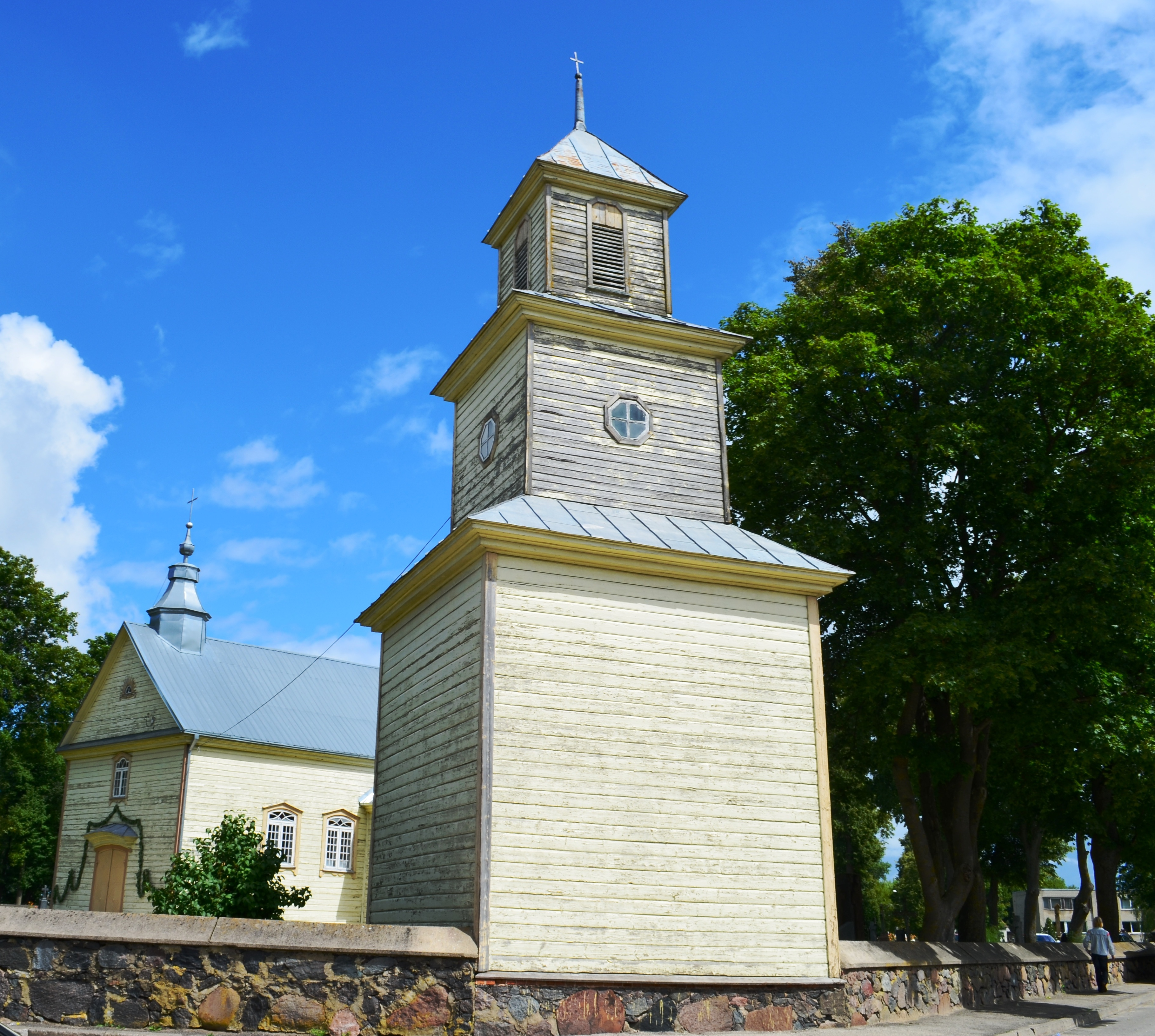 Upytės bažnyčios varpinė, Panevėžio raj.